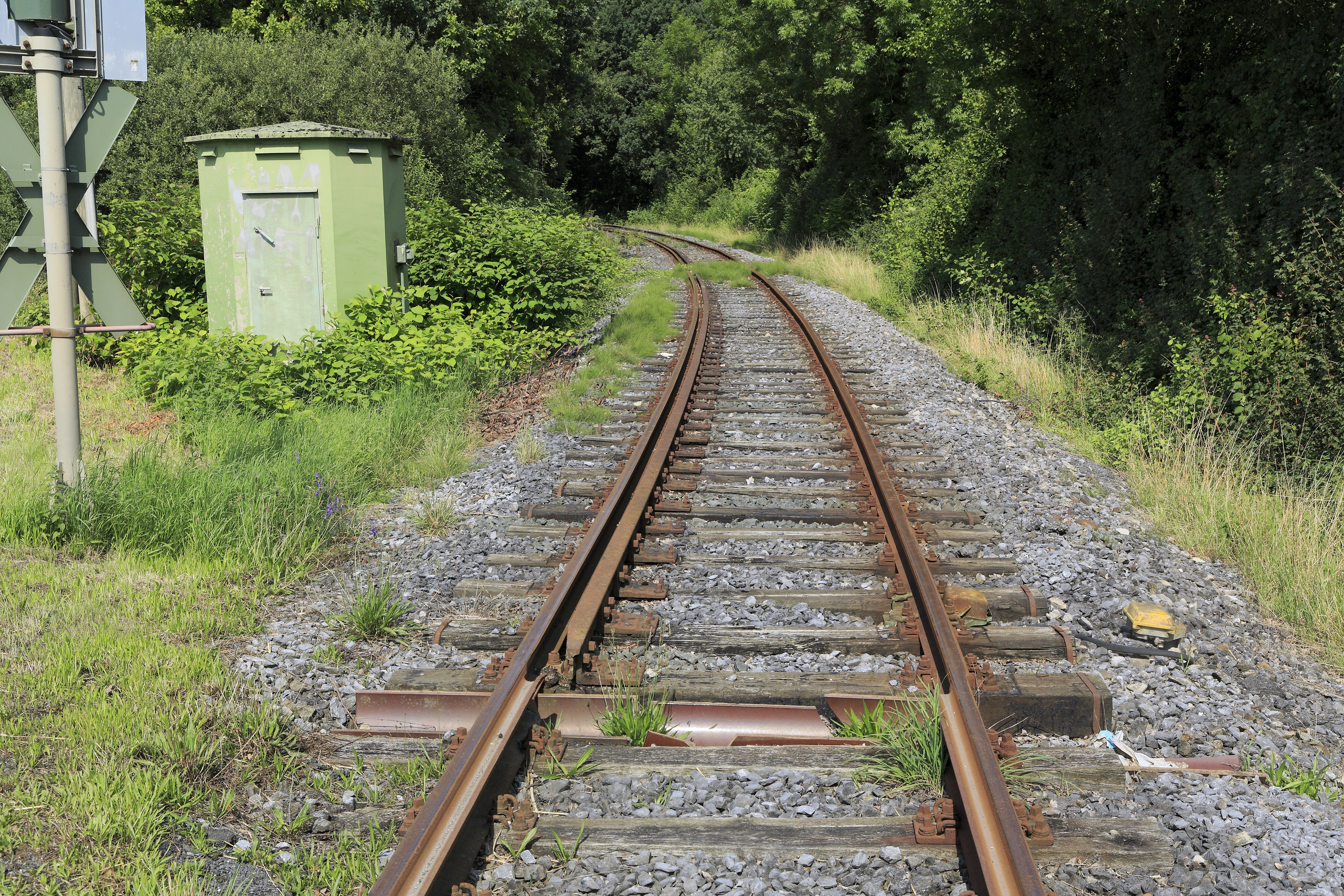 Der Wegübergang liegt im Bogen. Im unmittelbaren Überwegbereich liegen Rillenschienen mit Fernbahnprofil, daran anschließend preußischer Hakenplattenoberbau mit ebenfalls preußischen Leitschienen. Das Schienenprofil ist allerdings schon S 49. An der rechten Schiene ist ein einzelner Schienenkontakt S44 als Ausschaltkriterium der WÜSA eingebaut.